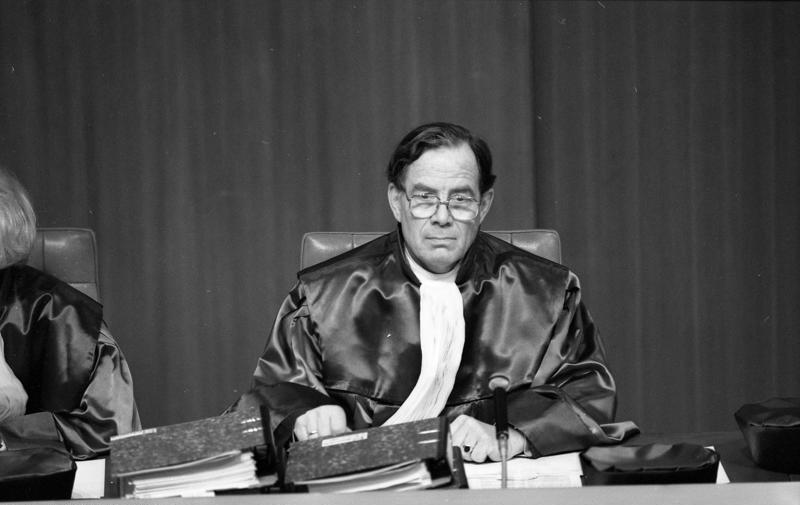 Am 17.1.1989 verhandelte der II. Senat des Bundesverfassungsgerichtes über die Verfassungsmäßigkeit des Bundeshaushaltsgesetzes für 1981. Damals hatte die SPD/FDP-Koalition die Kreditermächtigung für den Haushalt um 1,9 Millarden DM höher angesetzt als die für Investitionen vorgesehenen Ausgaben. Da nach Meinung der damaligen Opposition, der CDU/CSU-Bundestagsfraktion, hiermit gegen Artikel 115 des Grundgesetzes verstoßen wurde, hatten 231 Abgeordete der CDU/CSU-Fraktion am 6.9.1982 den Antrag beim Bundesverfassungsgericht gestellt, die Bestimmung über die damalige Kreditermächtigung für verfassungwidrig zu erklären. Artikel 115 verpflichtet, die Verschuldung unterhalb der für Investitionen vorgesehenen Ausgaben zu halten. Die Entscheidung in diesem "Abstrakten Normenkontrollverfahren" soll am 18. April 1989 verkündet werden.